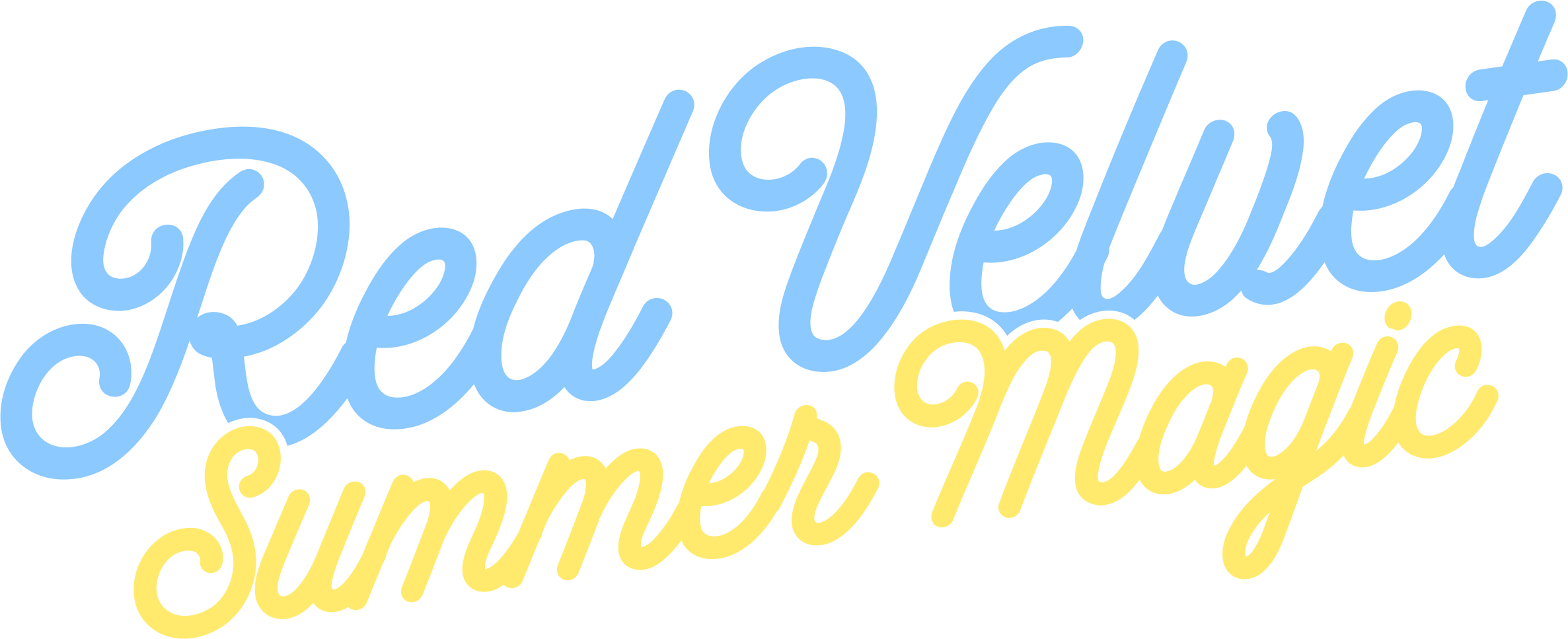 Logo de Summer Magic, EP de Red Velvet.